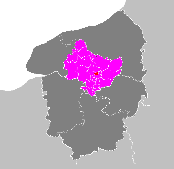 Maps of arrondissements and cantons of France: Arrondissement de Rouen - Canton de Mont-Saint-Aignan.PNG